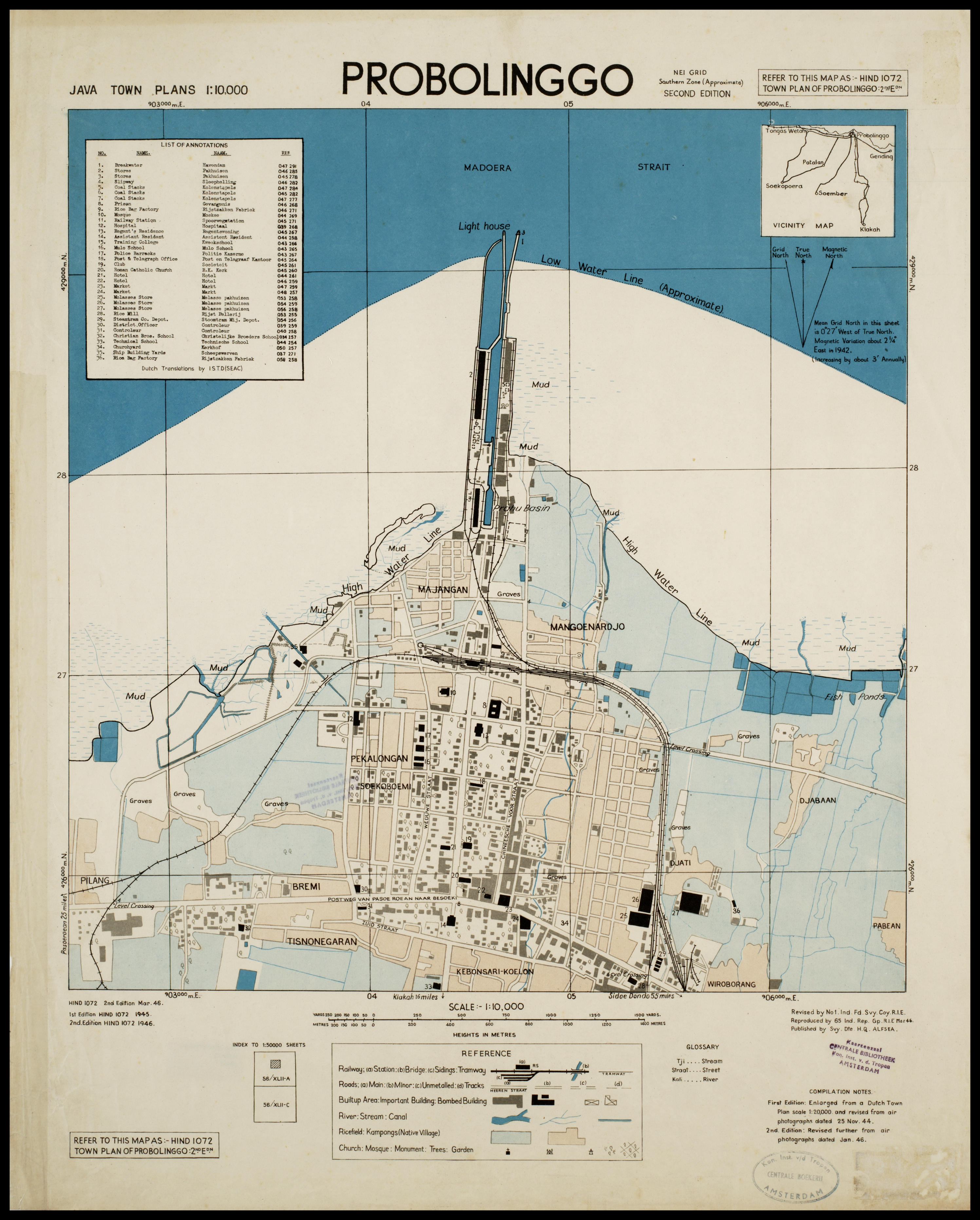 Peta kota Probolinggo tahun 1946.